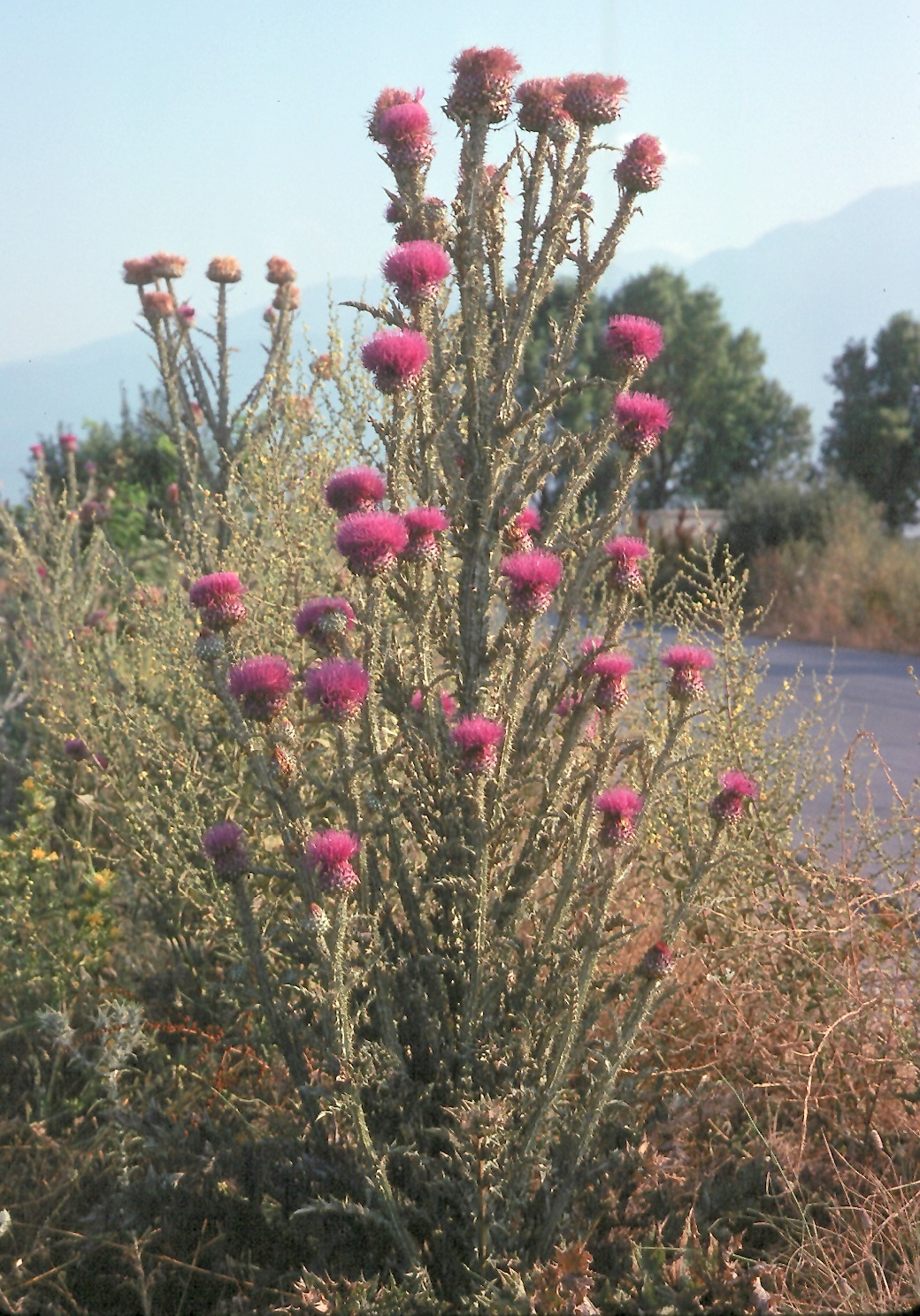 Onopordum illyricum (Cardo borriquero, Toba) - Vista general en antesis. Norte del Monte Olympos (Grecia)